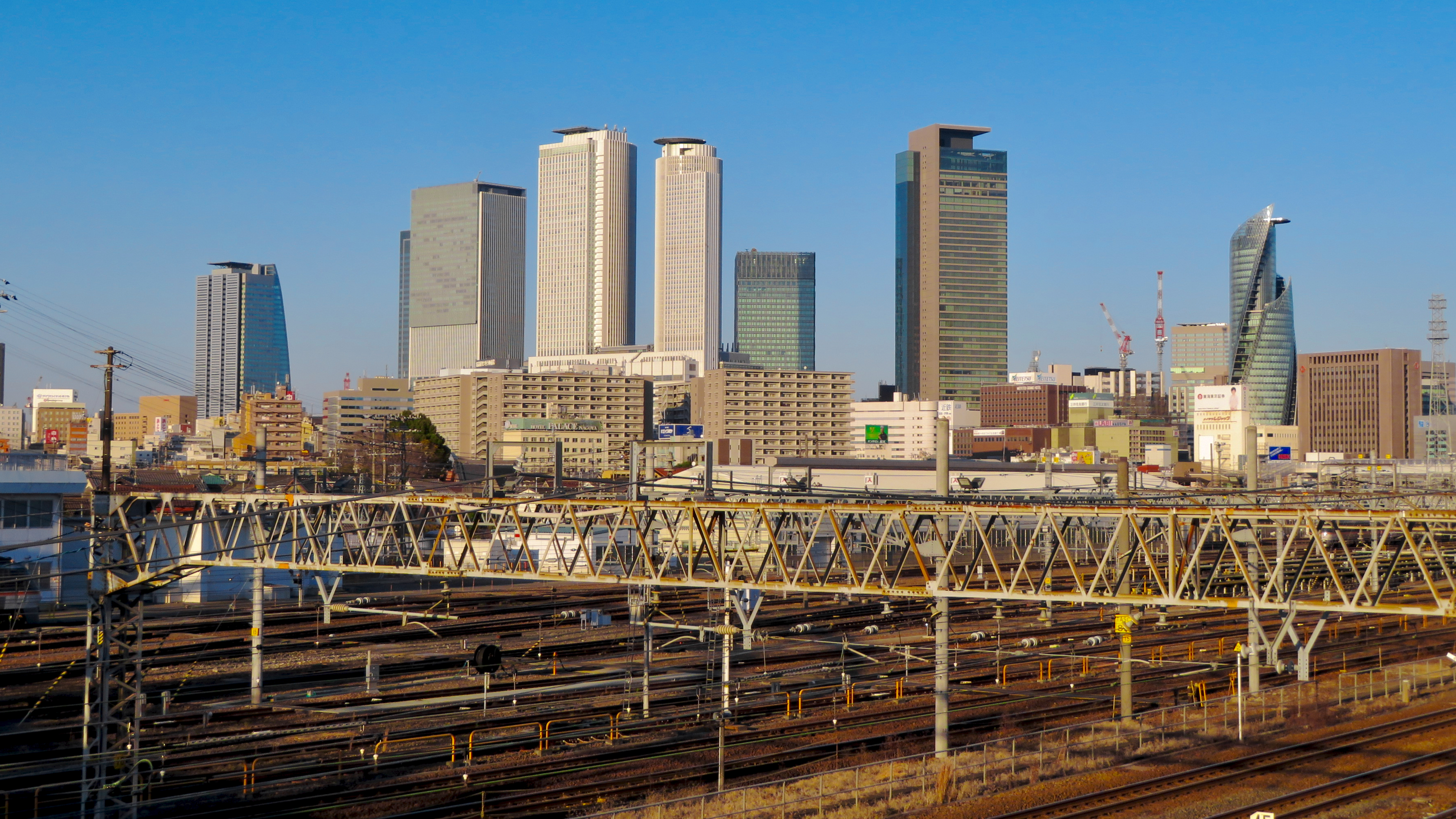 向野橋から見た名古屋駅周辺の高層ビル群。